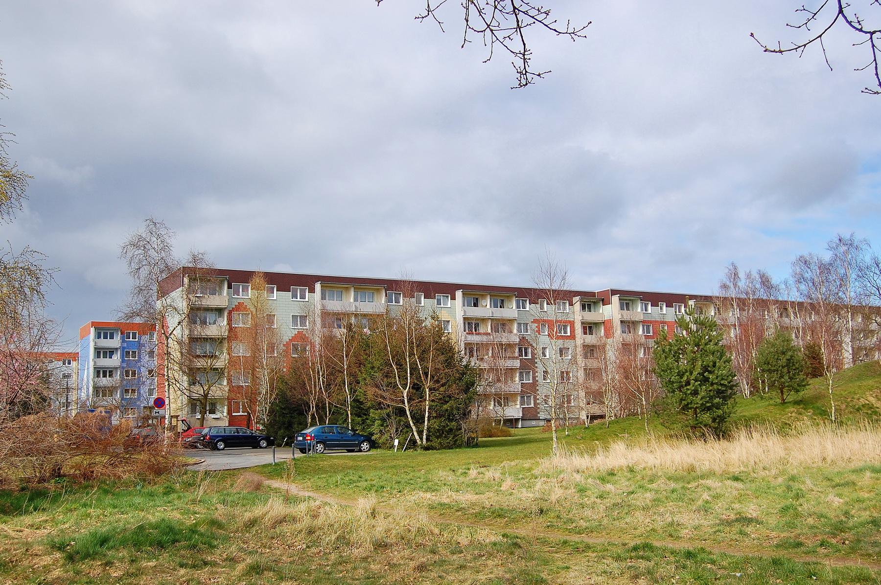 Plattenbauten am Heidering - Apartment buildings at Heidering